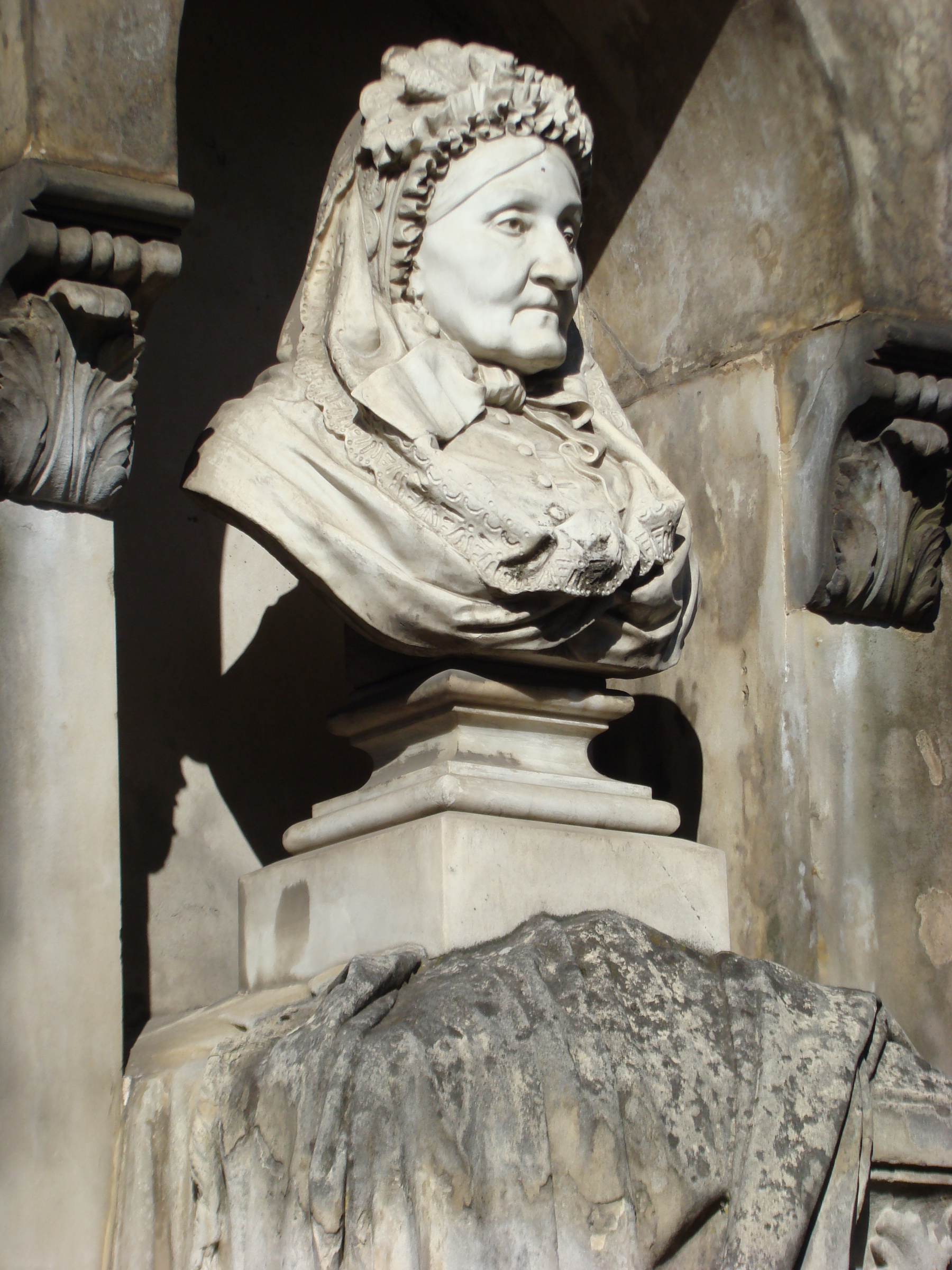 Cmentarz Ewangelicko-Augsburski w Warszawie, grobowiec Joanny Neybaur